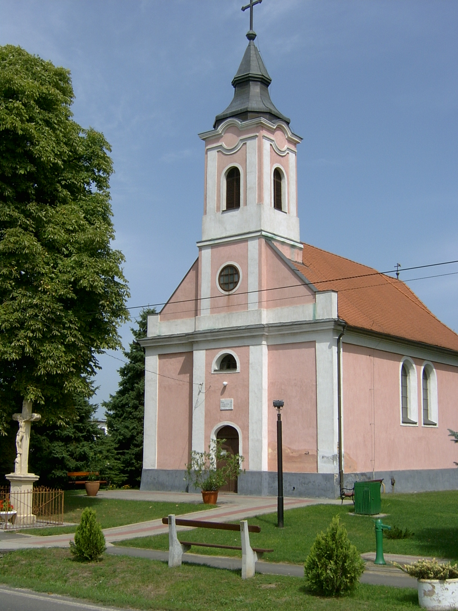 Udvar, katolikus templom